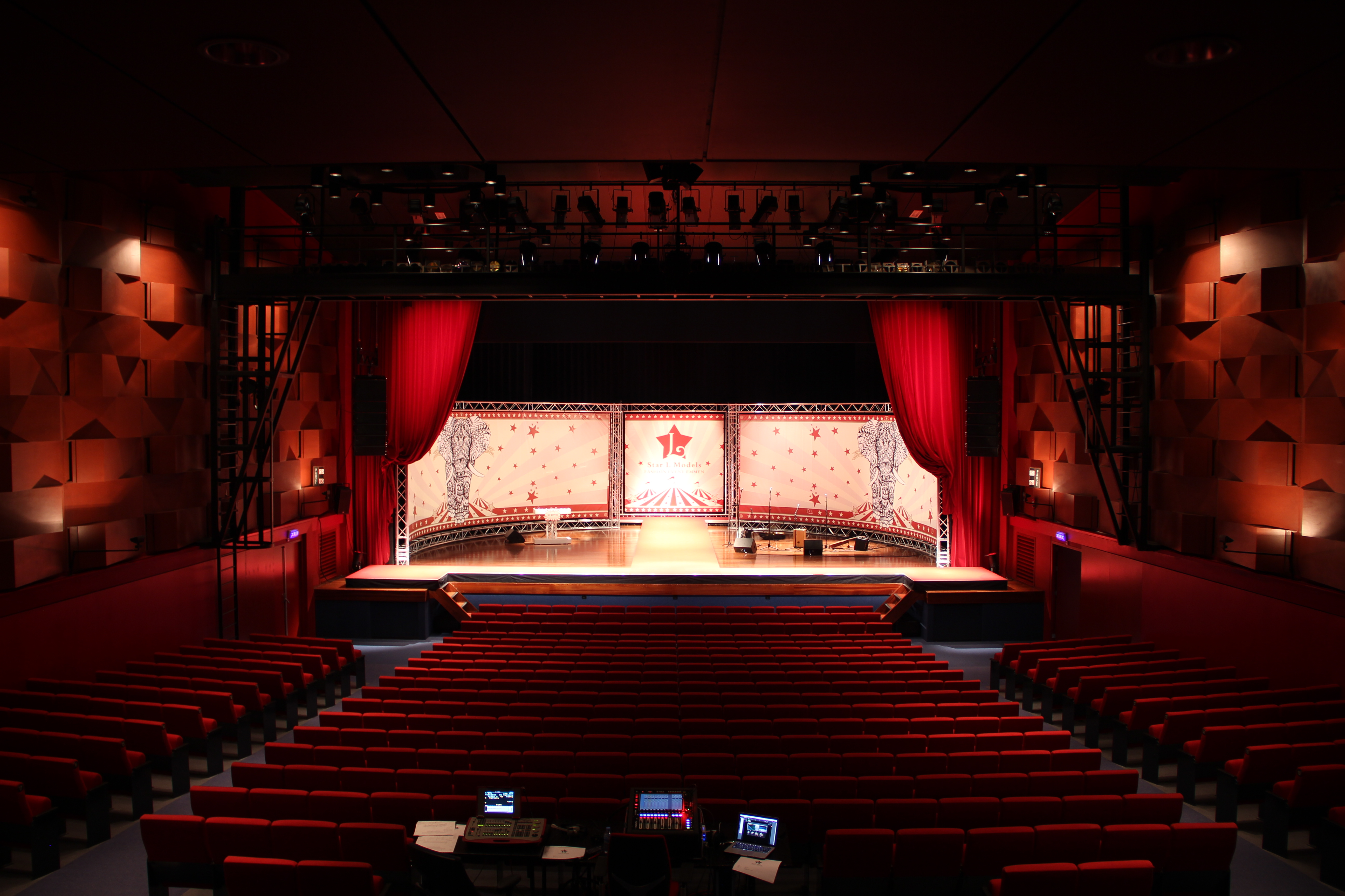 Theater De Muzeval tijdens een evenement in 20015